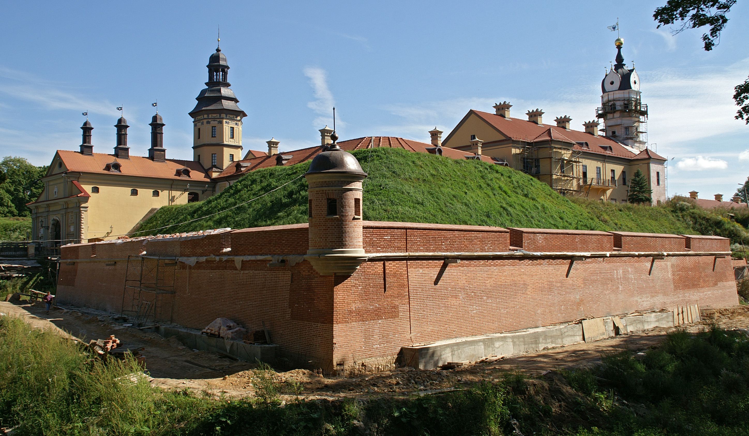 Беларуская (тарашкевіца): Палацава-паркавы ансамбль:замак-палац, паўднёвая і ўсходняя галерэі, камяніца, арсэнал з капліцай, брама, два прыбрамныя корпусы, паўночна-ўсходняя і паўднёва-заходняя галерэі, лядоўня, стайня;абарончыя збудаваньні і мост;тэрыторыя паркаў:Замкавы, Стары, Японскі, Ангельскі, Новы;водная сыстэма:Дзікі, Замкавы, Бэрнардынскі ставы. г. Нясьвіж This is a photo of Belarusian heritage monument. Reference number: 610Г000466 ( WLM)